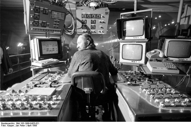 Unterwellenborn, Maxhütte, Walzwerk-Steuerbühne ADNZB/Kasper 25.4.89 Bez. Gera: Generalreparatur Maxhütte Chef auf der Steuerbühne ist Walzensteller Hans-Peter Krauße. Monitore zeigen ihm einzelne Walzprozesse, ein Computer ist für die vollautomatische Prozessüberwachung eingesetzt. Nach Abschluß einer mehrwöchigen Generalreparatur nahm das moderne Walzwerk der Maxhütte Unterwellenborn wieder den planmäßigen Betrieb auf.